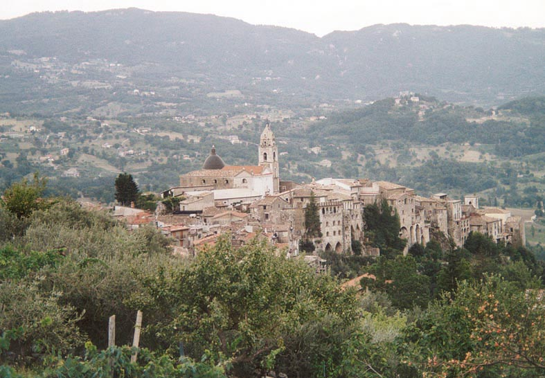 Panorama del centro storico di Cusano Mutri (BN)